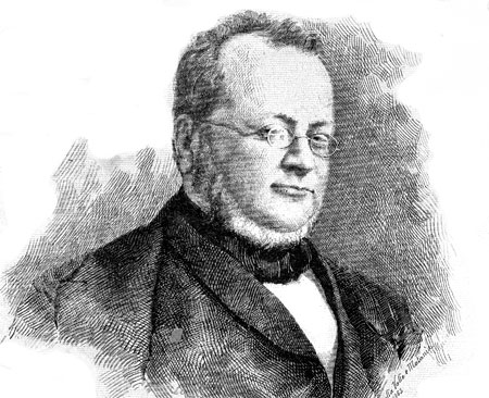 Camillo Cavour